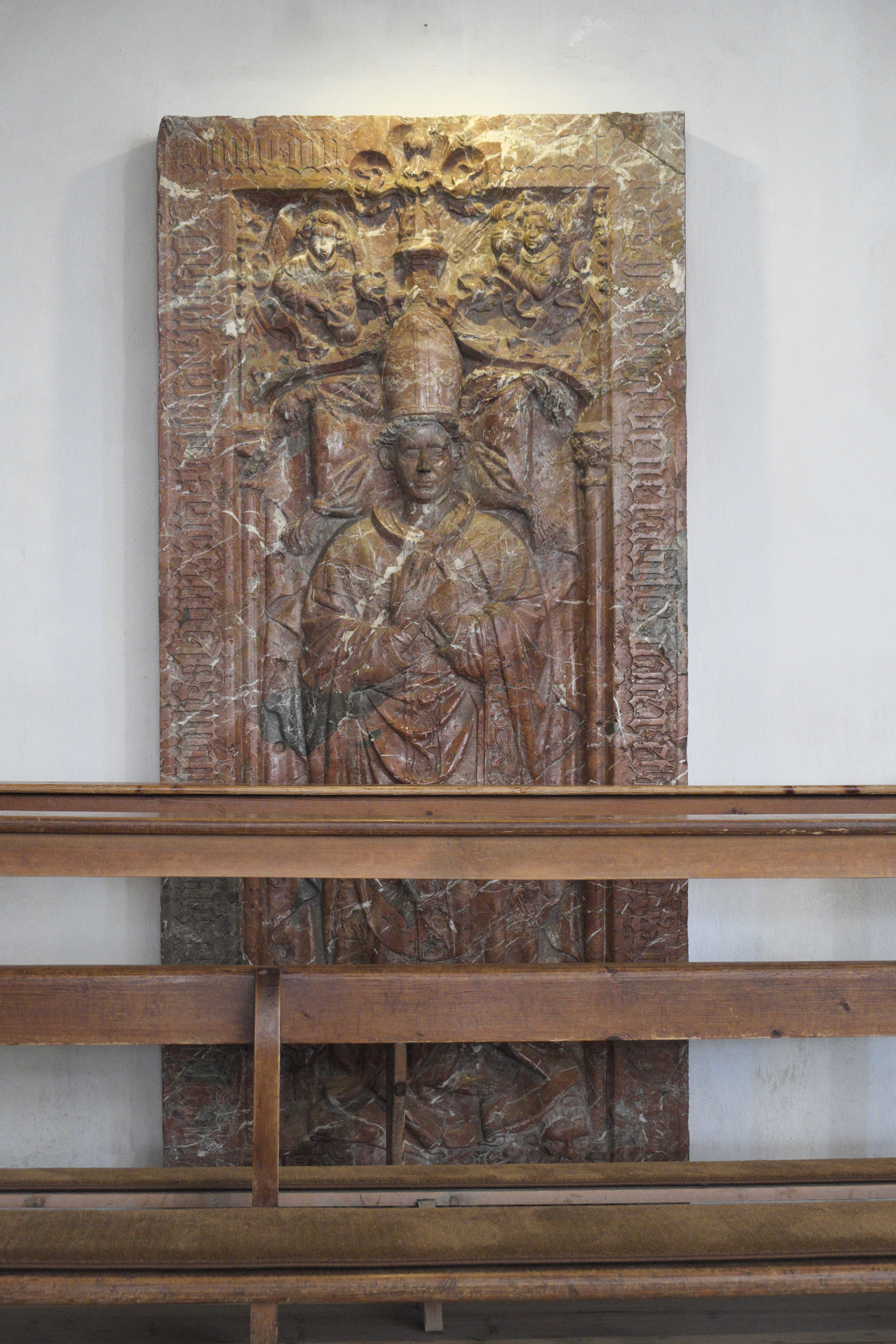 Katholische Pfarrkirche, ehemalige Augustiner-Chorherrenstiftskirche Mariä Geburt in Rottenbuch im Landkreis Weilheim-Schongau (Bayern/Deutschland), Epitaph für den Probst Georg Neumair († 1472)